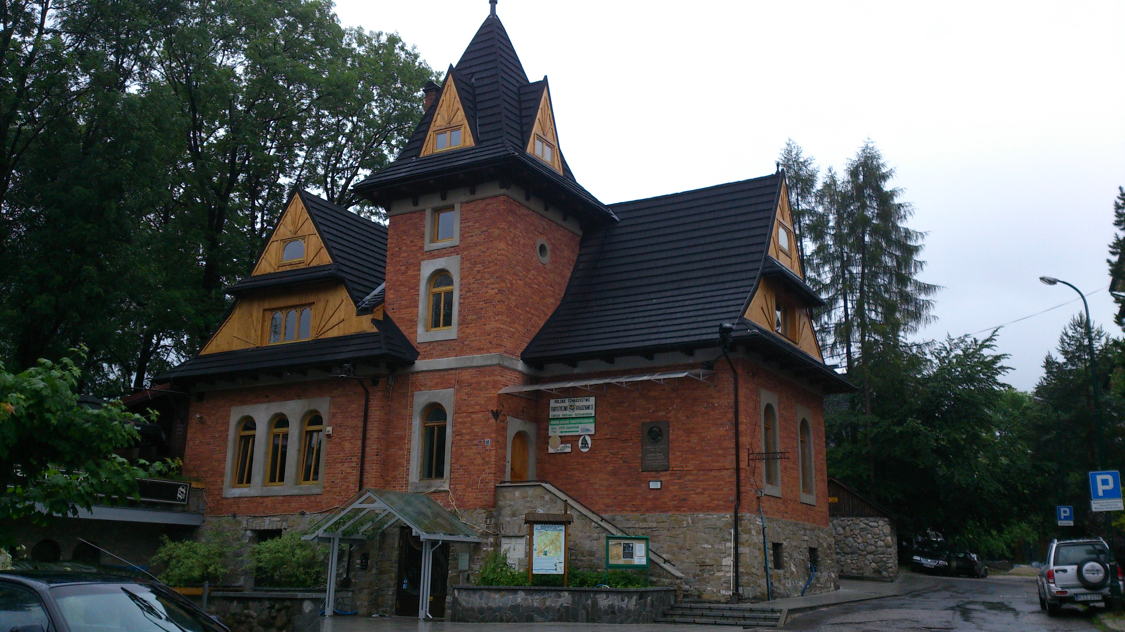 Dworzec Tatrzański, Zakopane, 2014